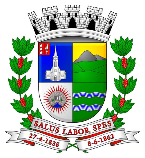 DESCRIÇÃO HERALDICA - Escudo português esquartelado. O primeiro quartel de blau (azul), com a silhueta da majestosa igreja Matriz de Santa Maria Madalena, de prata, com um cantão de goles (vermelho) carregado de três silhuetas de casas simples, postas em pala, à destra, e a silhueta da primitiva igreja e uma cruz latina, também postas em pala, a sinistra, tudo de prata. O segundo quartel de ouro, com a representação da silhueta, onde se destaca a Pedra Dubois ao natural, cortado em contrabanda por um campo ondulado de sinople (verde). O terceiro quartel de prata, com a representação de uma gruta-nicho, de pedras, com a efígie de Nossa Senhora de Lourdes, e uma pequena vegetação de sinopla (verde) a destra e a sinistra da abertura, de cuja base escorre uma fonte de água de blau (azul), todo o conjunto assentado num resplendor de goles (vermelho). O quarto quartel de sinopla (verde) com duas faixas onduladas de prata e aguadas de blau (azul), sendo a superior reduzida com três ondulações e a inferior com quatro. Na base um listel de prata, forrado de goles (vermelho) com três dobras, ostentando os seguintes dizeres de sable (preto): 27-4-1935, SALUS LABOR SPES e 8-6-1862. Como suportes, dois ramos de cafeeiro de sinopla (verde), frutado de goles (vermelho), à destra e à sinistra, e passados em aspa sob o escudo. Encimando o conjunto, a coroa mural de cinco torres de prata, abertas e iluminadas de sable (preto).